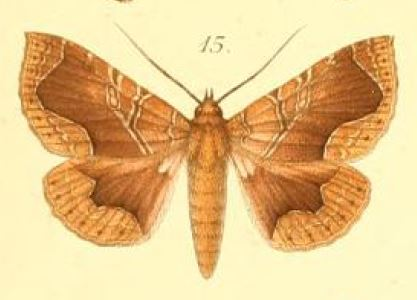 Calligraphidia opulenta (Möschler, 1887) (Ophisma)